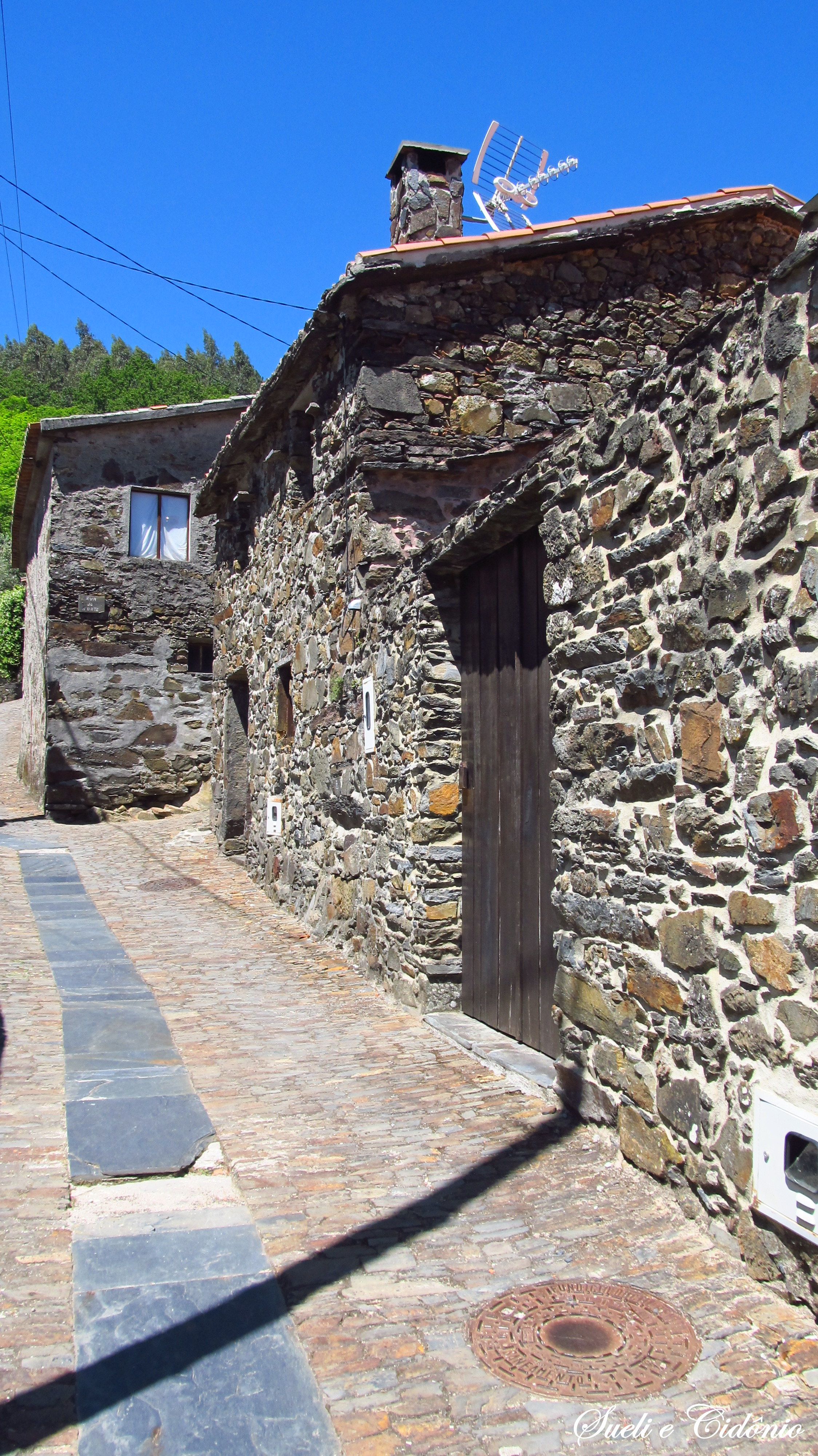 Aldeia do Xisto - Serra da Lousã